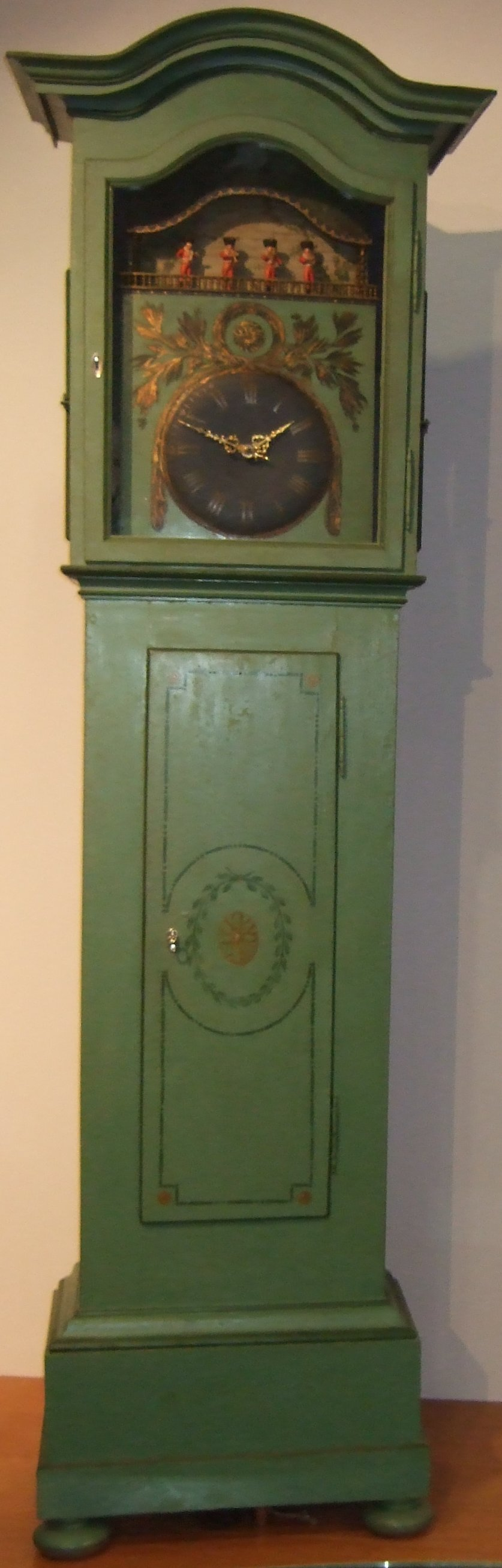 Musikuhr ausgestellt im Deutschen Uhrenmuseum.